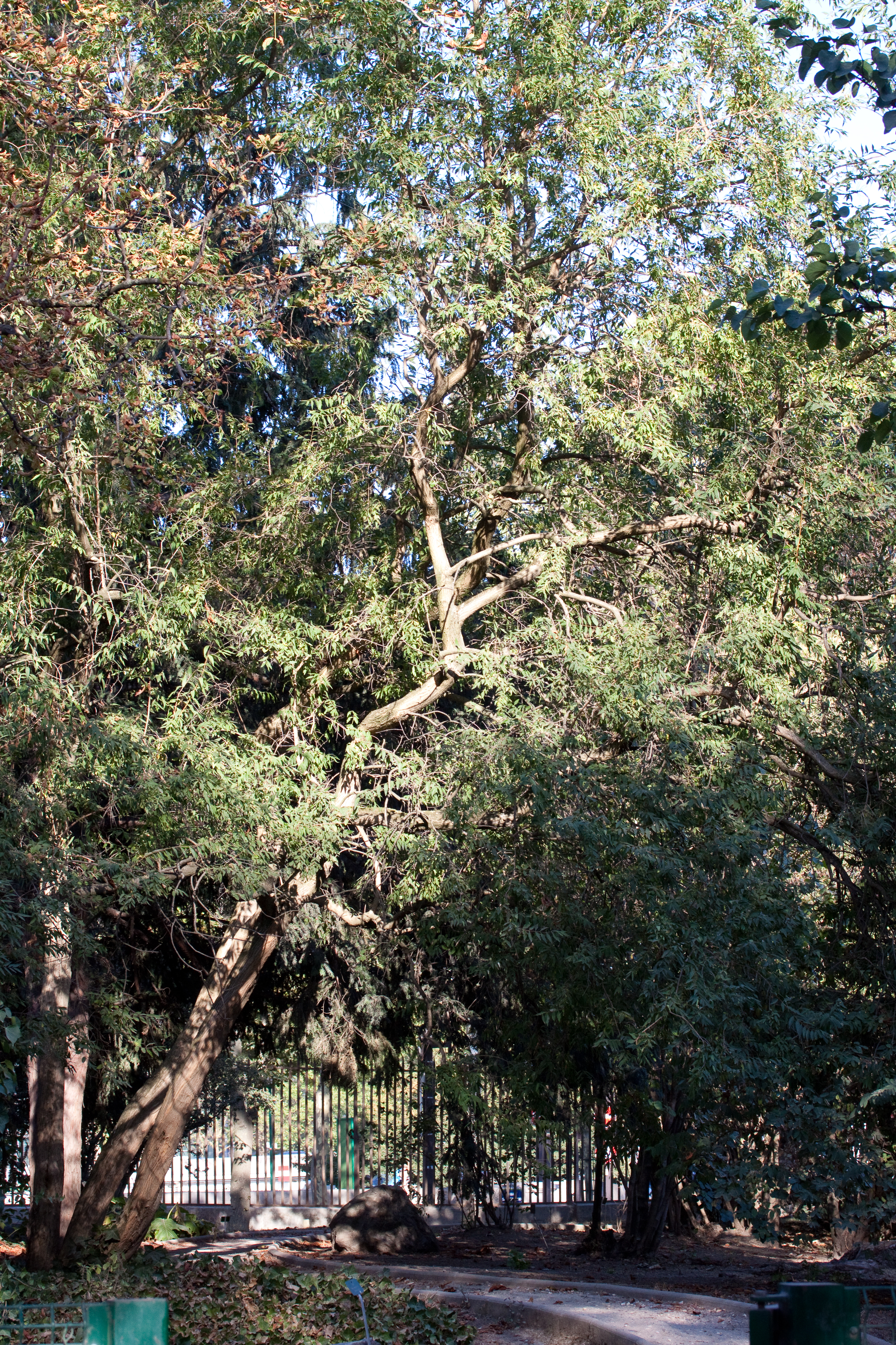 Vue générale de Fontanesia fortunei au Jardin des Plantes - Paris